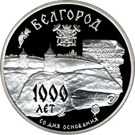 Монета Банка России — Серия: «Памятники архитектуры России», 1000-летие основания г. Белгорода, 3 рубля, реверс.